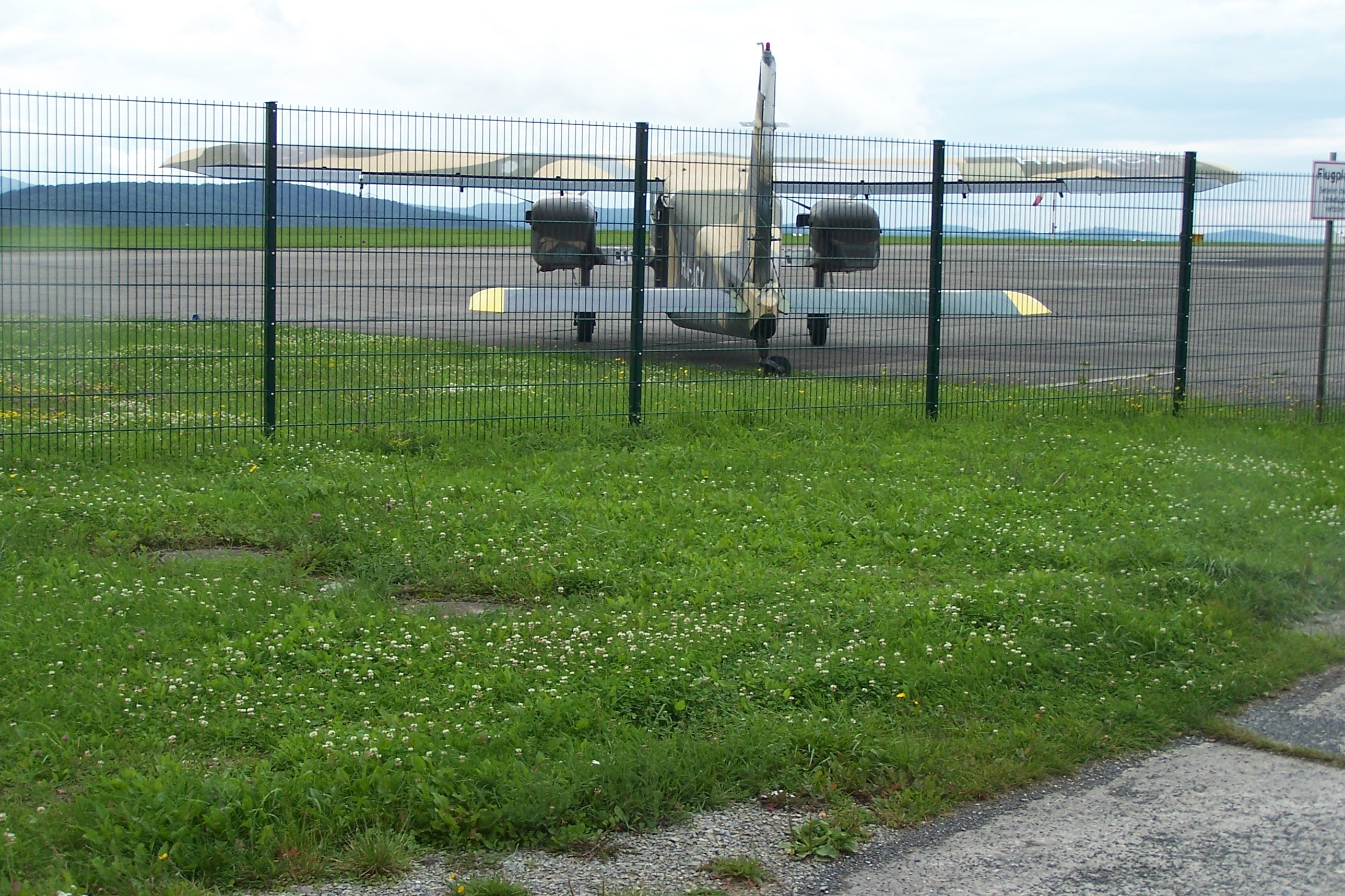 Am Rande des Flugplatzgeländes abgestellte Maschine.